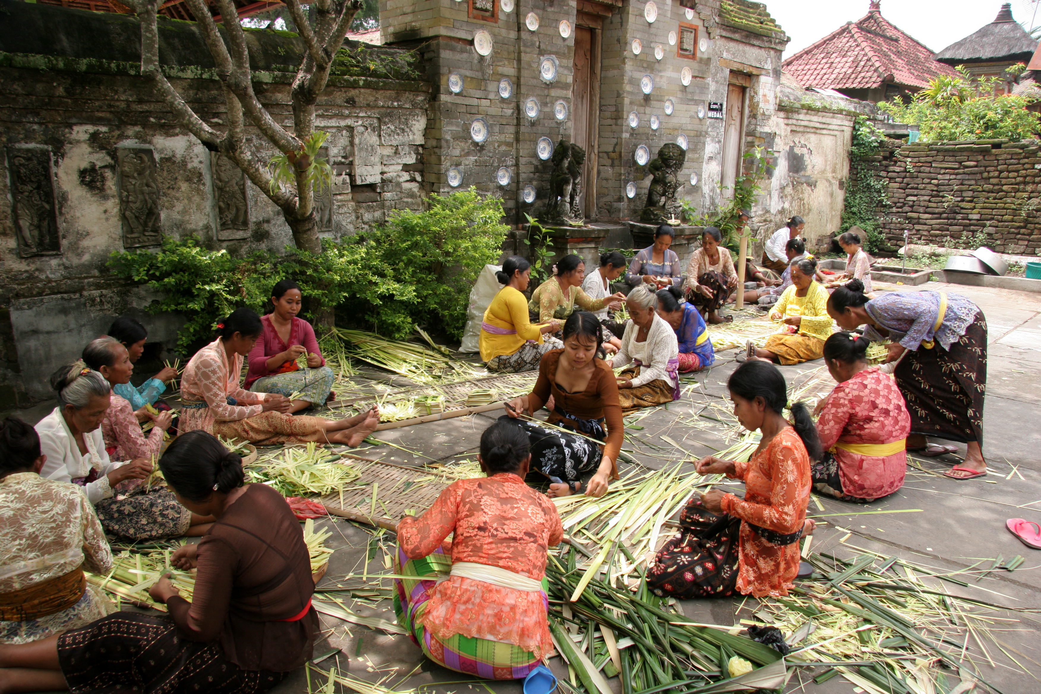 bali femme préparant les offrandes pour la fête du temple